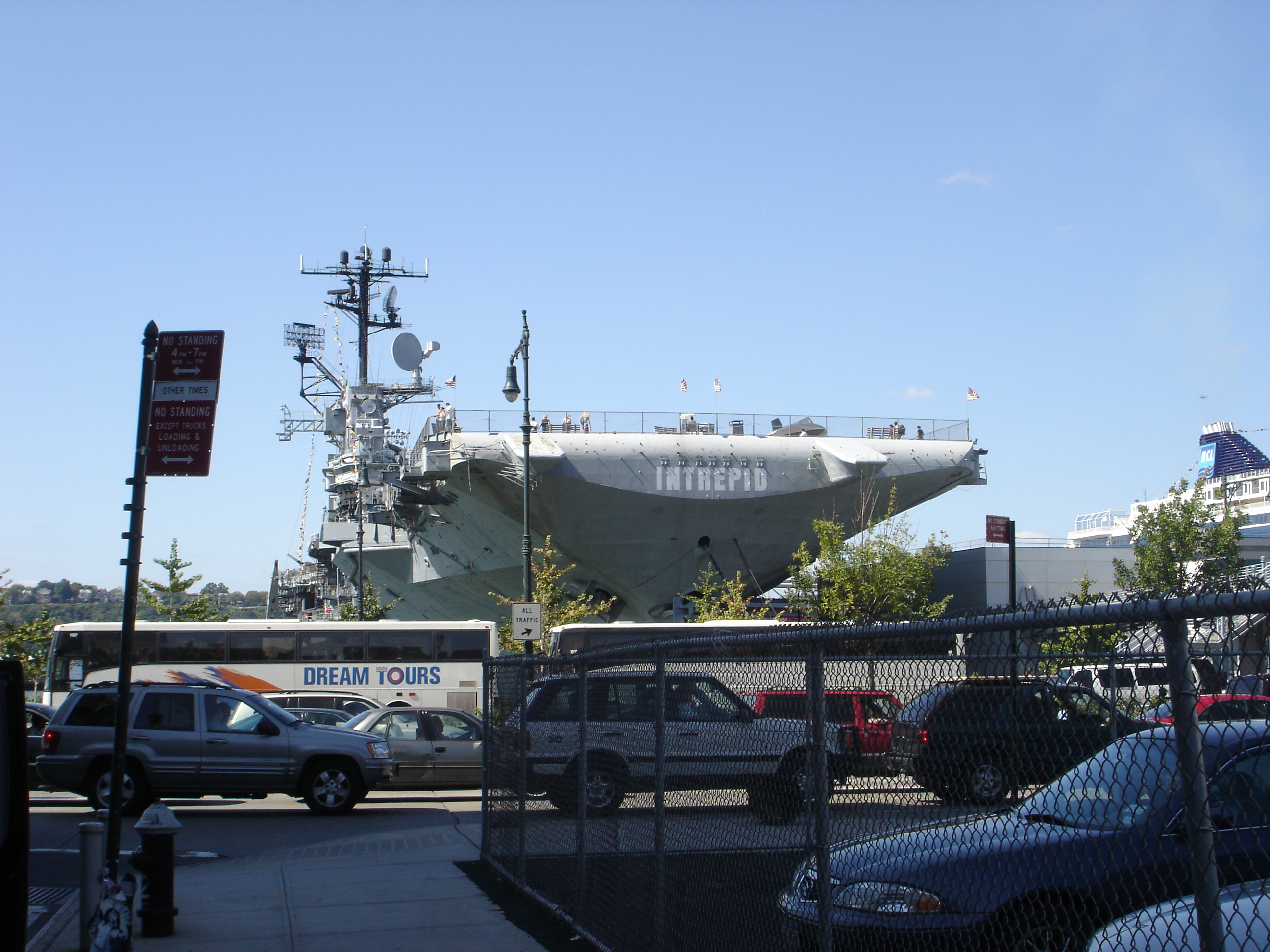 Flugzeugträger USS Intrepid 2005 in New York City